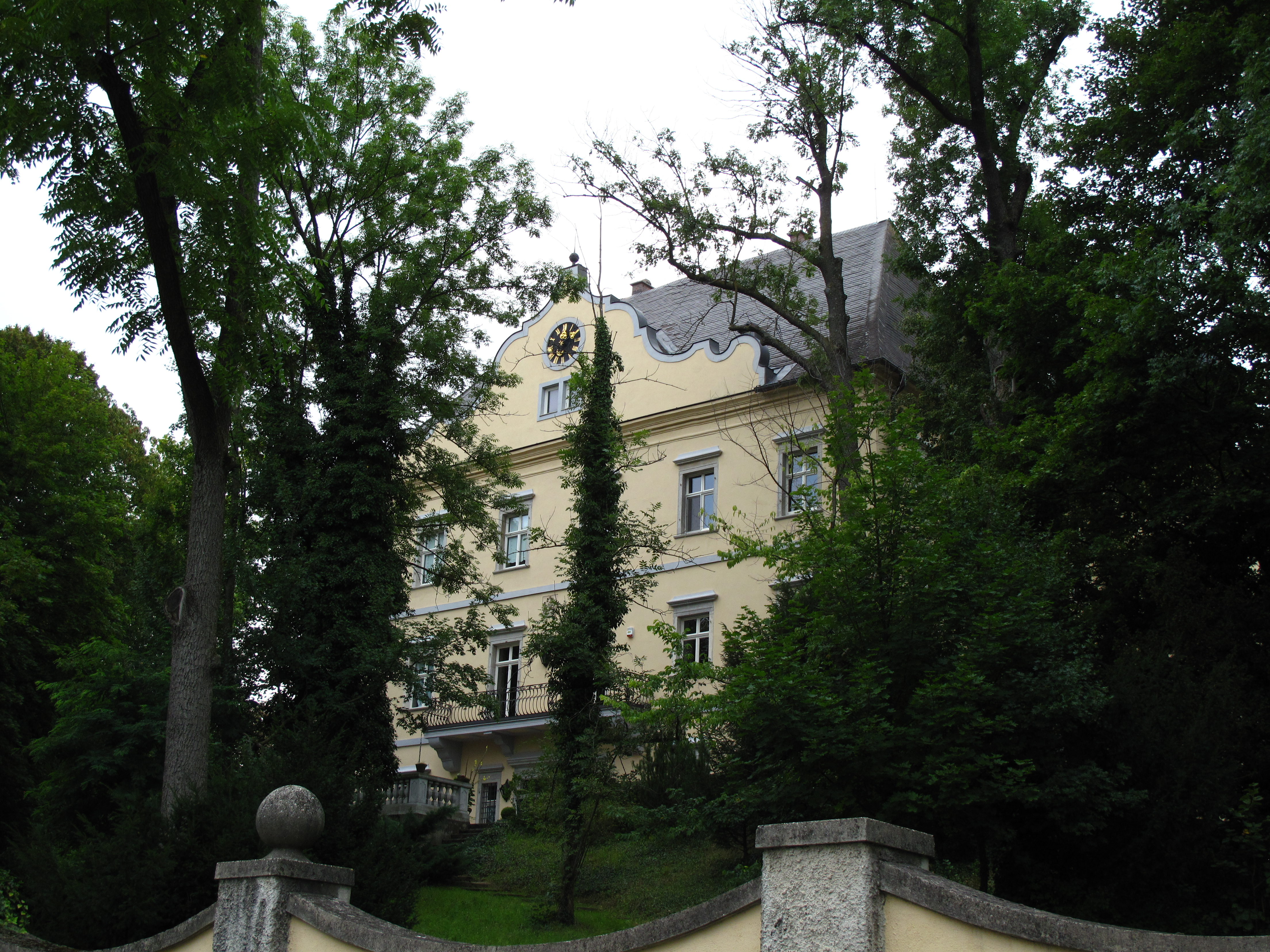 Schloss Plankenberg